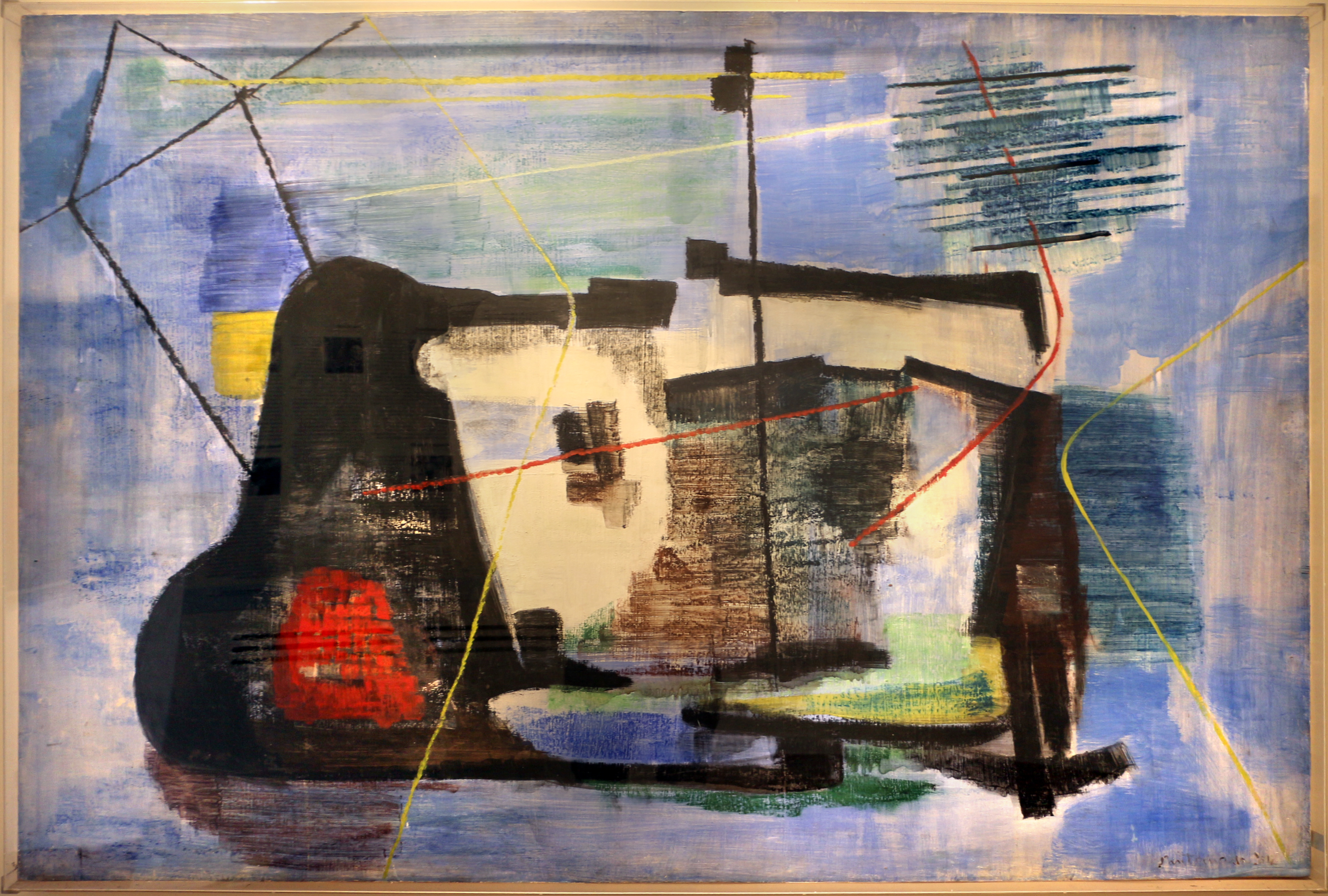 Collezione Mosaici Moderni - NB: Museum explicitly authorized the upload of its contemporary art collection for WLM 2016 (for further info ask WLM Italy organizators). This is a photo of a monument which is part of cultural heritage of Italy.